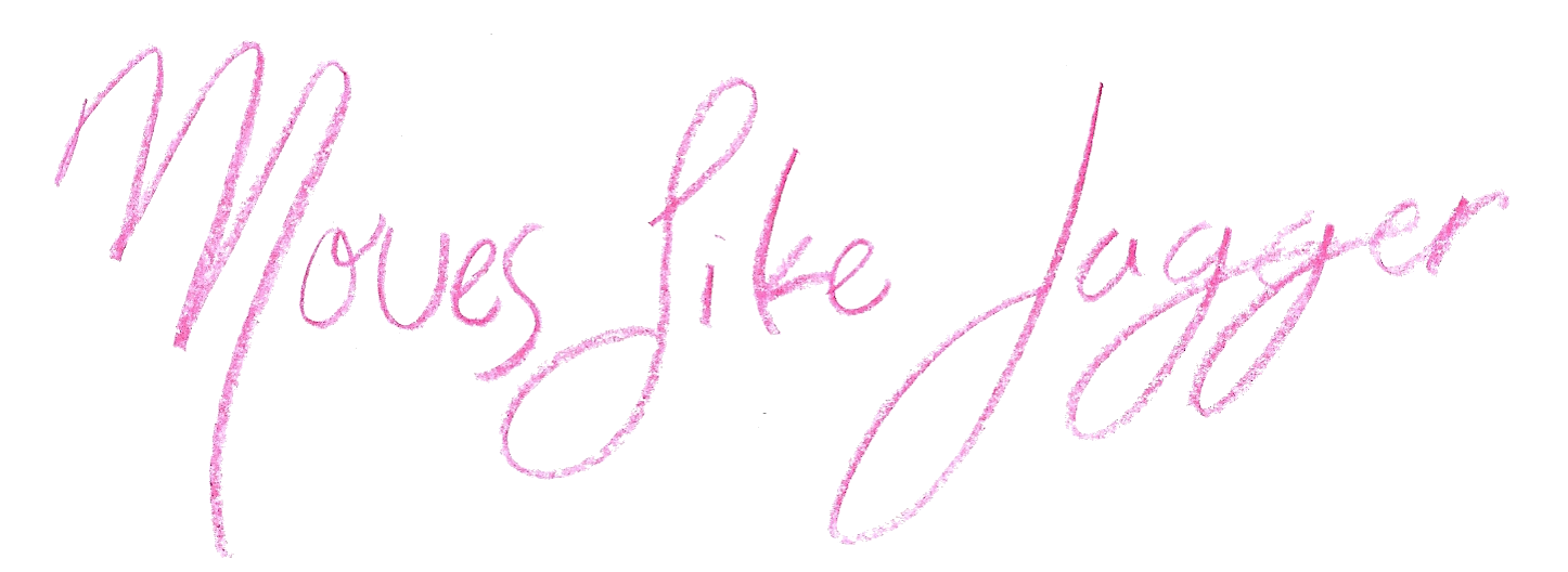 Logotipo hecho a mano por mi del sencillo de Maroon 5 "Moves Like Jagger".